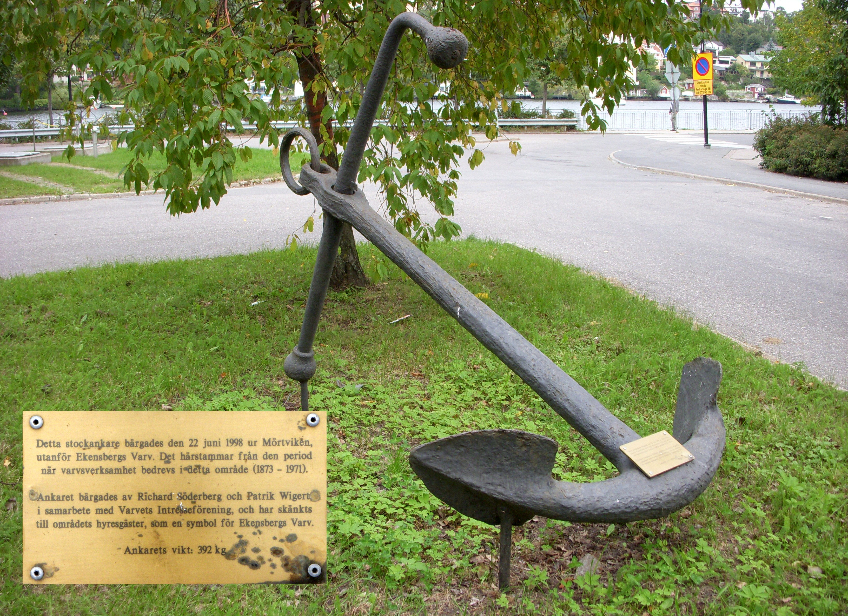 Ekensberg, minnet på varvstiden